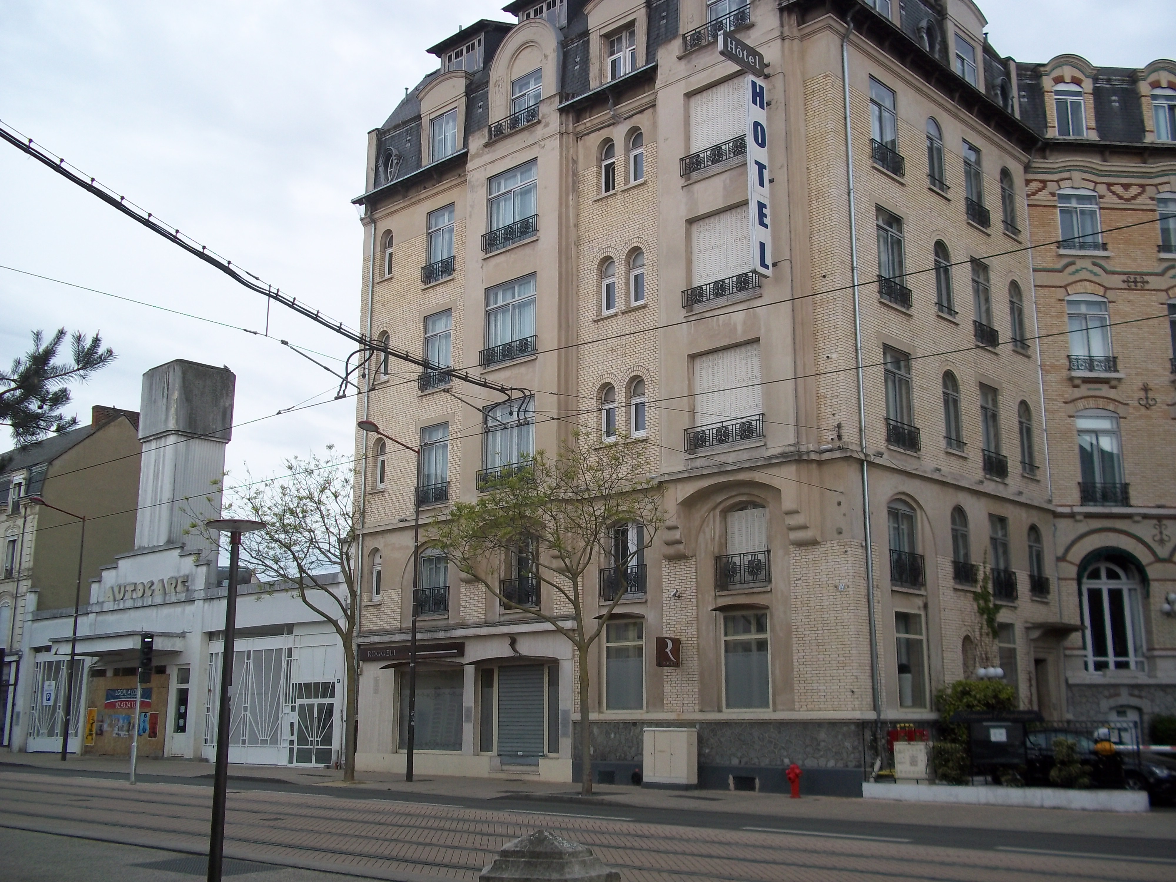 L'hotel Concorde et l'ancienne gare routière - Le Mans